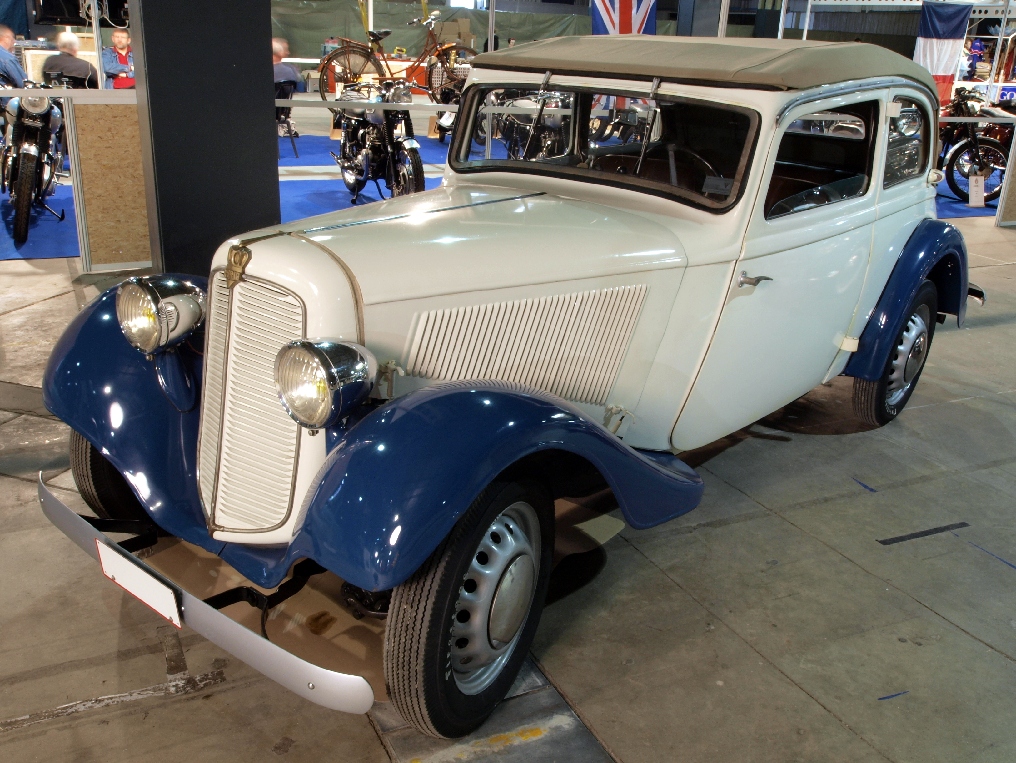 Imperia TA 7 Hirondelle (1937)